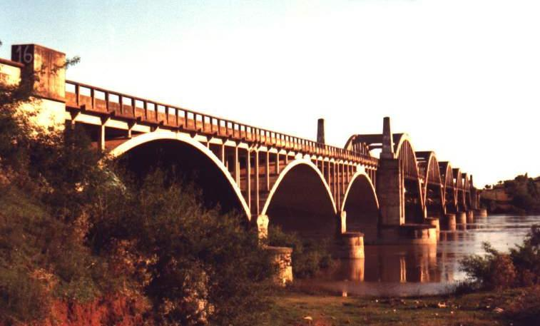 Visão Lateral da Ponte General Osório